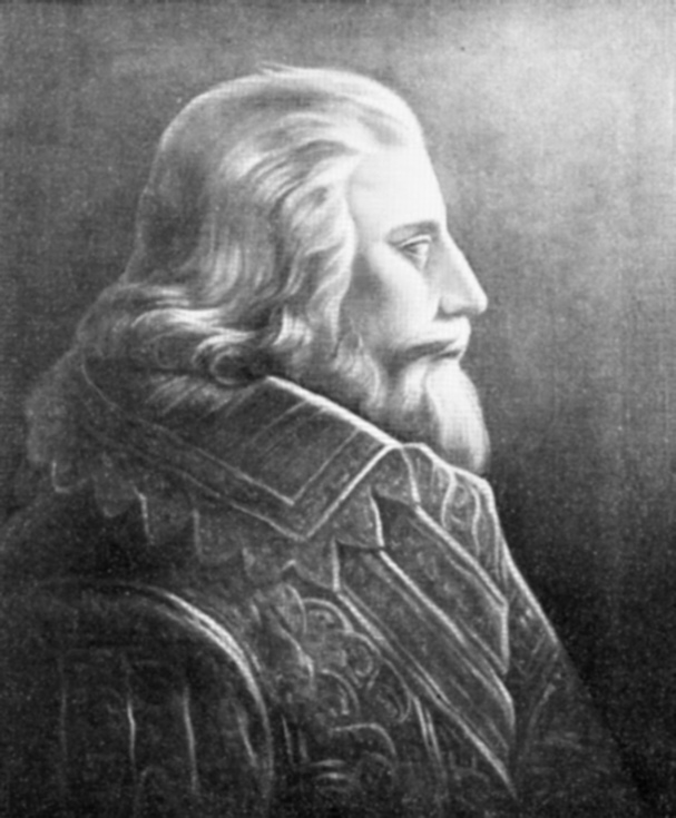 Johann Friedrich von Schleswig-Holstein-Gottorf (1579-1634), Prince-Bishop of Lübeck